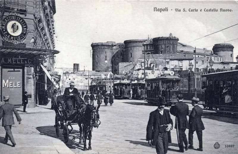 "Napoli - Via San Carlo e Castello Nuovo" prima dell'abbattimento dei bastioni. Cartolina. Autore sconosciuto.